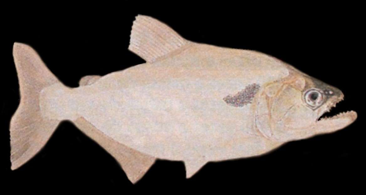 Desenho de uma Pirambeba - (Serrasalmus elongatus), por Johann Natterer, parte da missão ao Brasil de naturalistas do imperador austríaco Francisco I, de 1817 a 1835 (no Rio São Francisco existe a Serrasalmus brandtii, também chamada de Pirambeba.